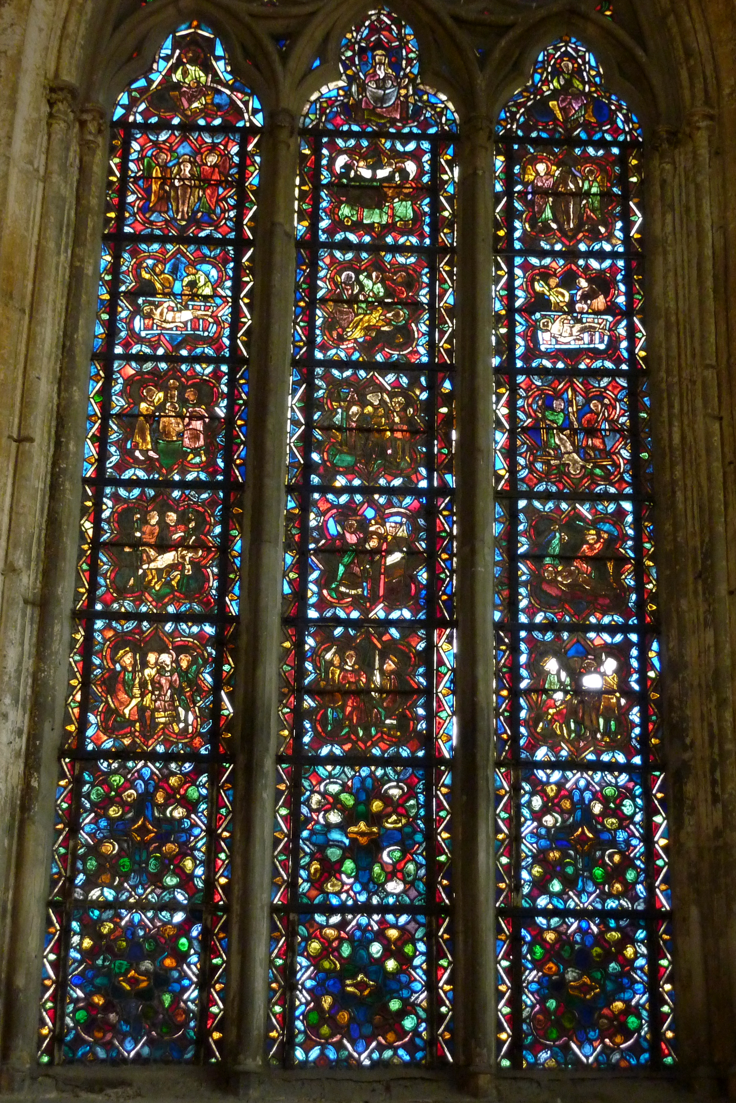 Kirche Sainte-Anne in Gassicourt, einem Stadtteil von Mantes-la-Jolie im Département Yvelines (Île de France), Bleiglasfenster des südlichen Querhauses (13. Jh.) mit Szenen des Martyriums des hl. Vinzenz (links), des hl. Stephanus (Mitte) und des hl. Laurentius (rechts)